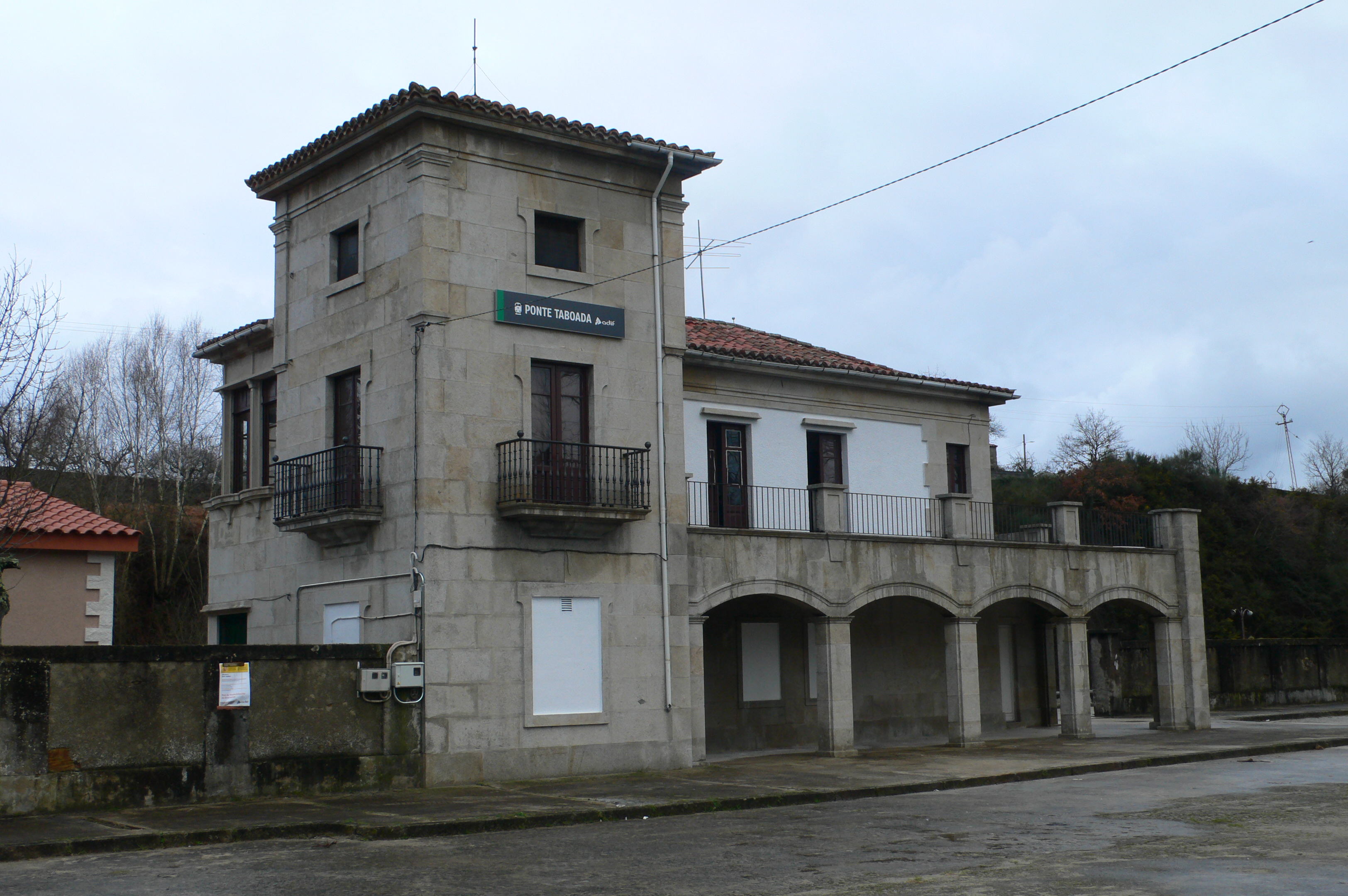 Vista de la estación